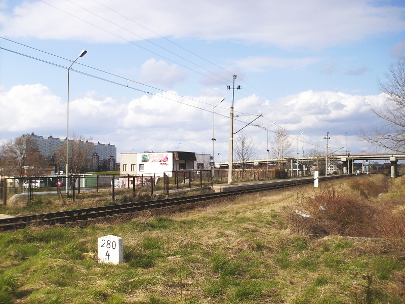 Stacja kolejowa Legnica Piekary